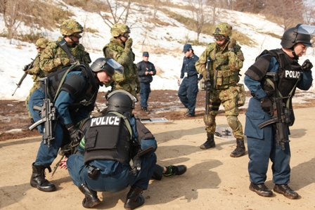 2014年2月26日に第44普通科連隊が実施した治安出動下令下の規定に基づく自衛隊と警察との共同実動訓練での写真。警察と共同して不審者（ゲリコマ）の侵入を阻止、拘束要領などを実施した。